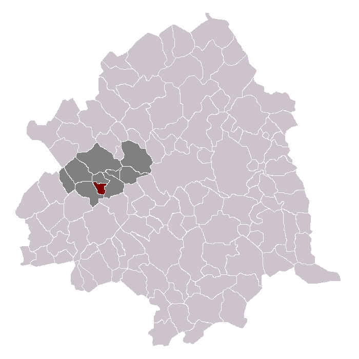 Erquinghem-le-Sec